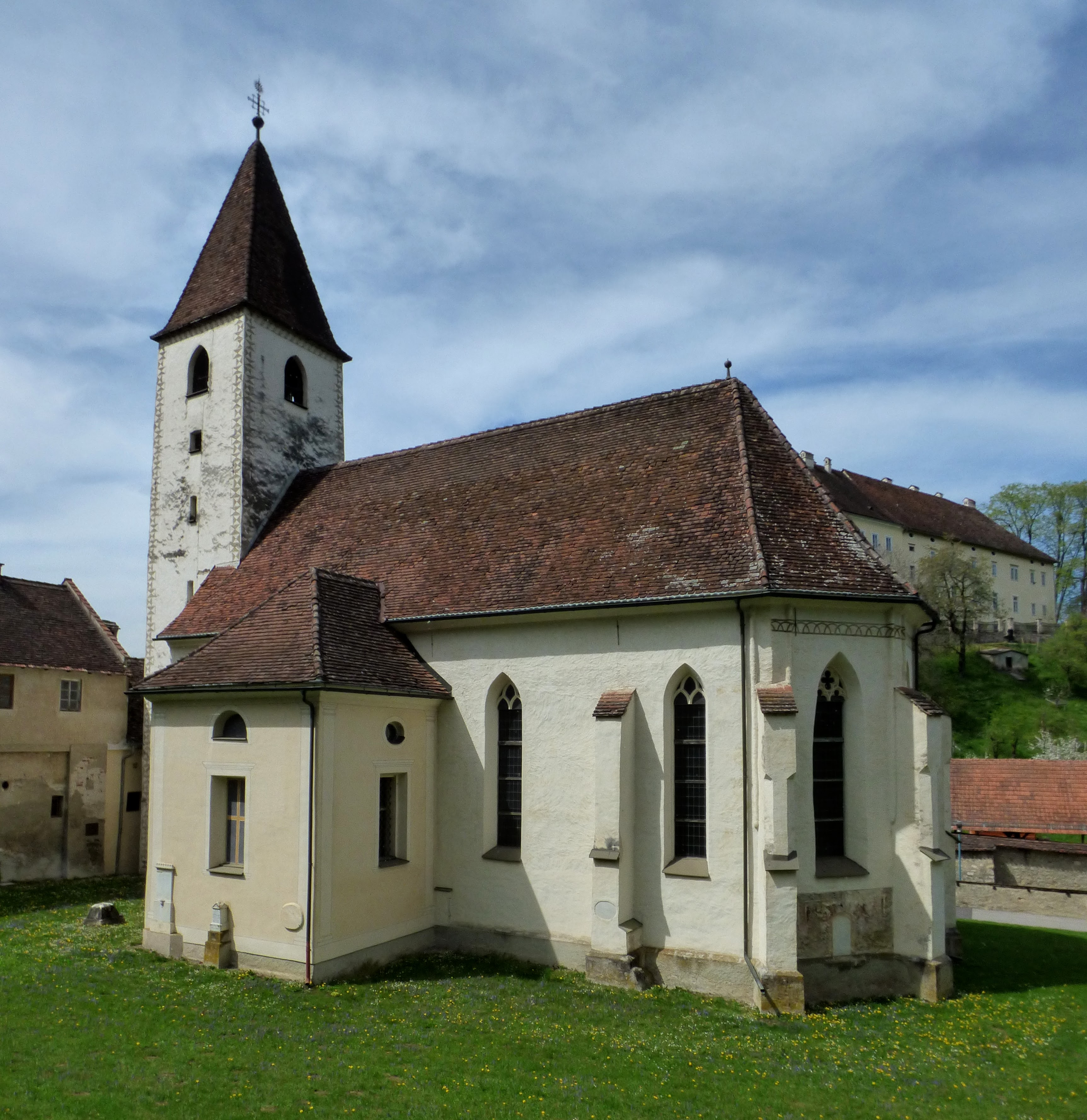 Kirche Hl. Erhard, St. Paul im Lavanttal. Object location46° 41′ 58.84″ N, 14° 52′ 27.37″ E